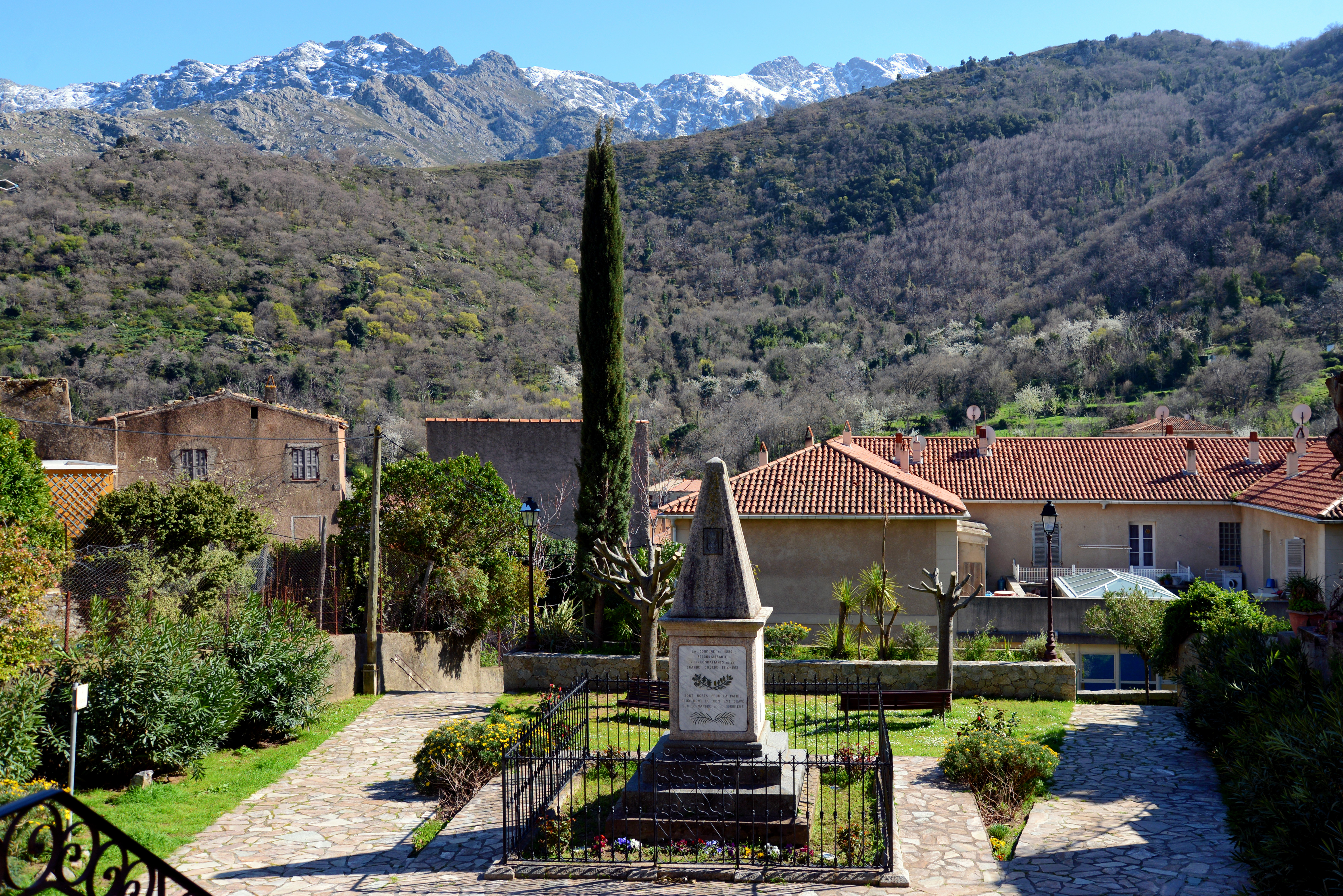 Muro, Balagne (Haute-Corse) - Monument aux morts Première Guerre mondiale 1914 - 1918